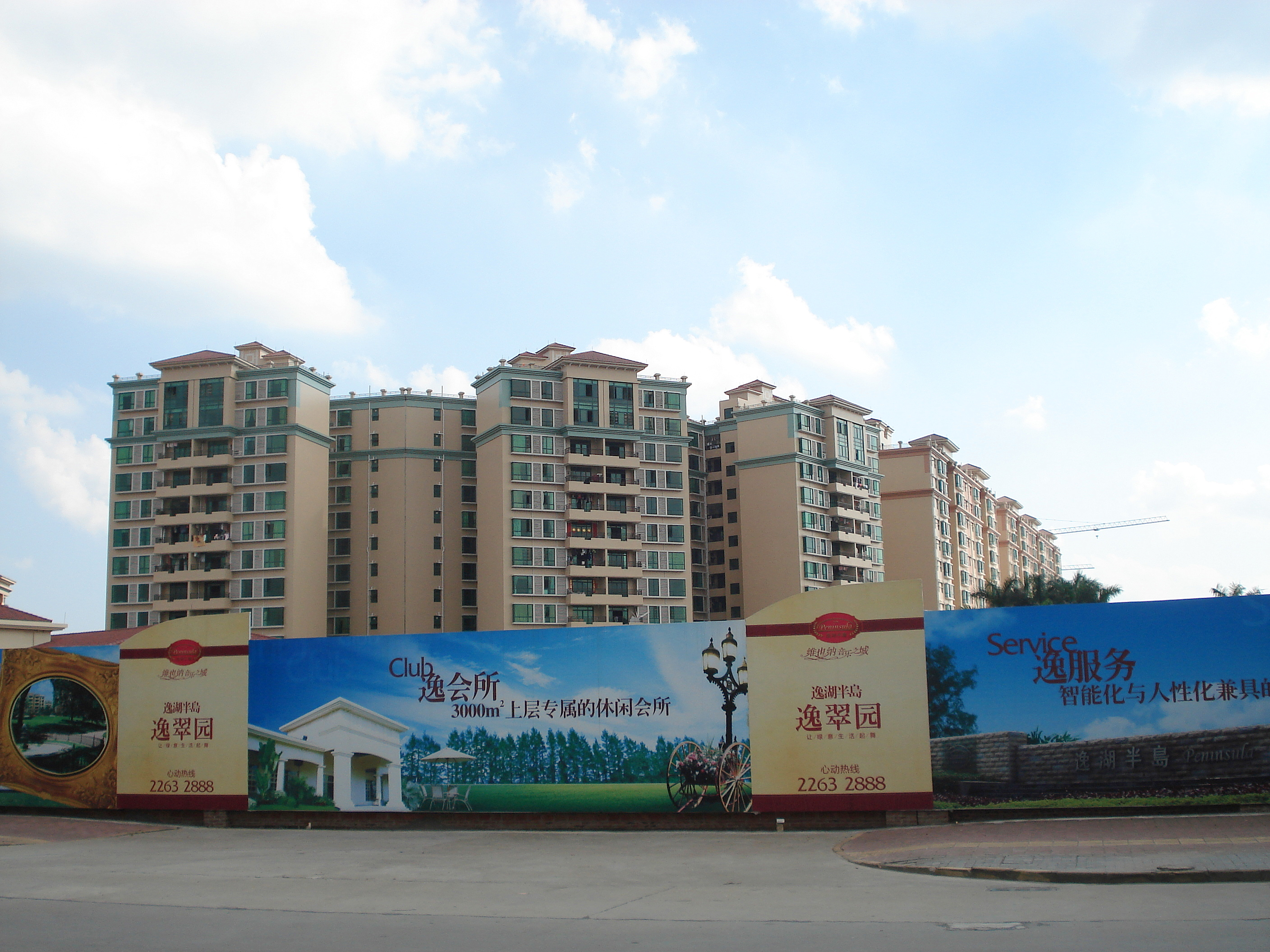 中文（香港）: 位處中山市東鳳鎮發展中之逸湖半島地產